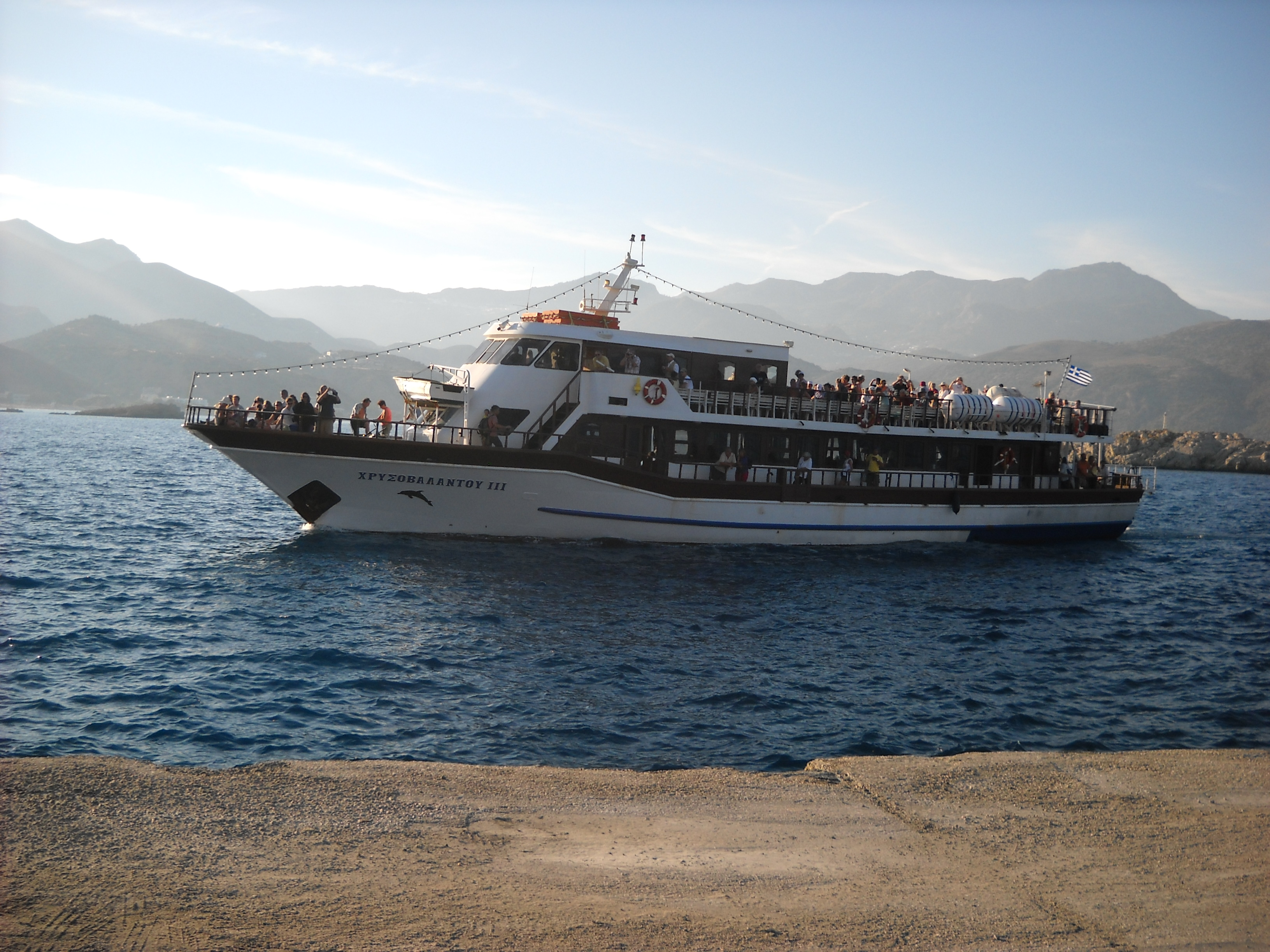 Fähre (Ausflugsboot) von Karpathos Stadt nach Diafani (Olymbos) und Saria. Mehr Info über die Fährverbindungen usw.